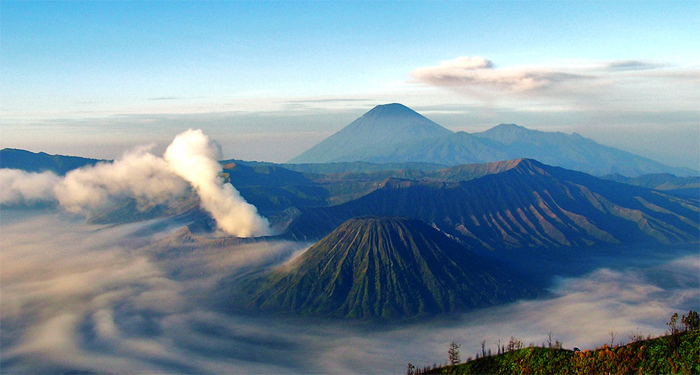 Mts. Bromo-Semeru-Batok-Widodaren, Tengger Caldera, East Java